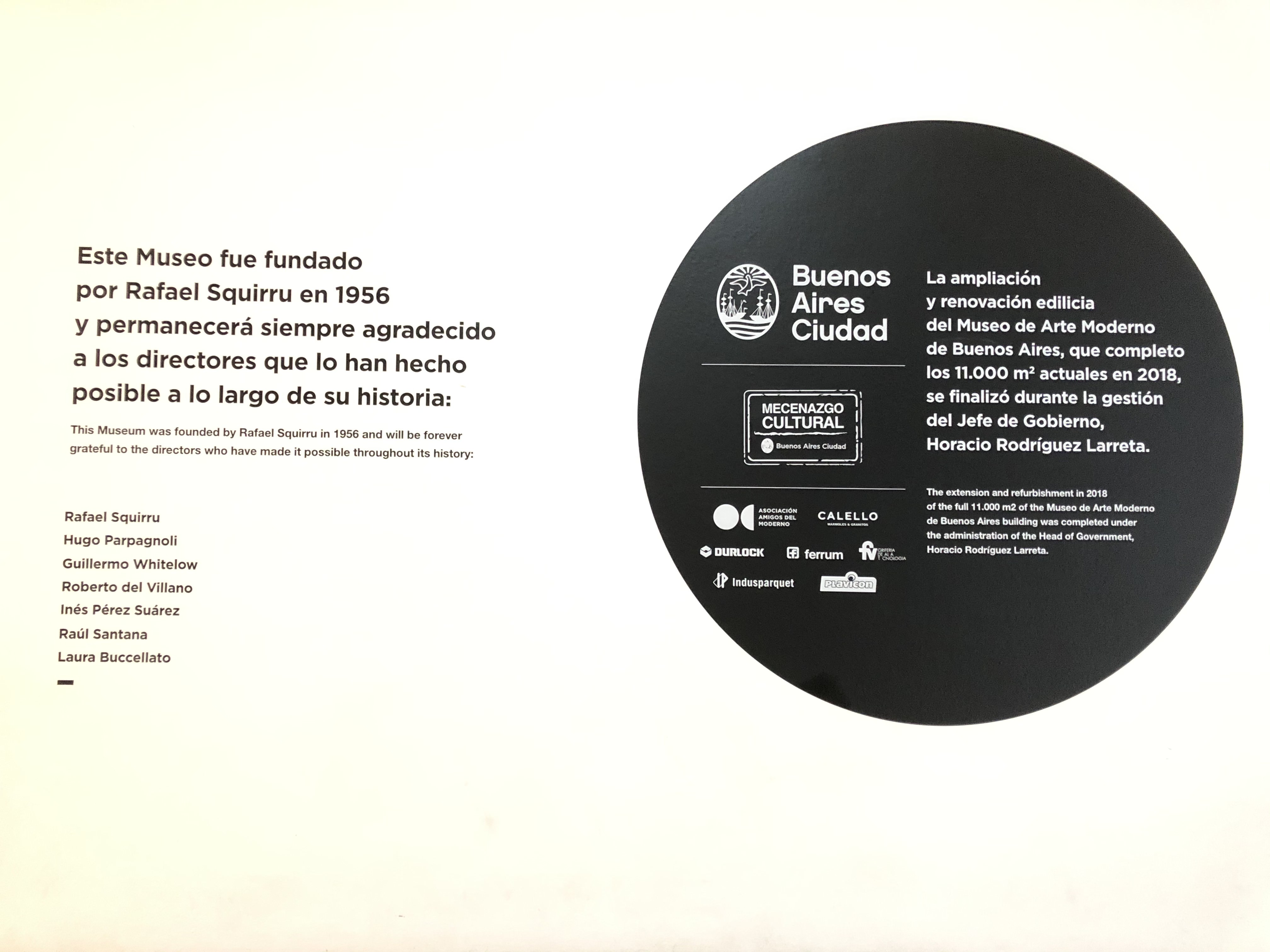 placa mamba